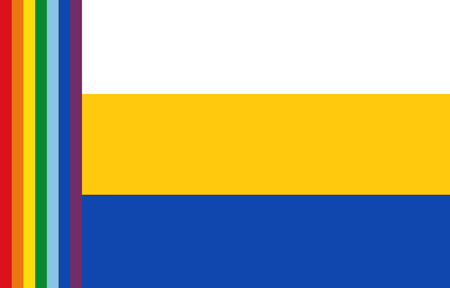 Bandera de la provincia de Espinar, departamento del Cusco, Perú